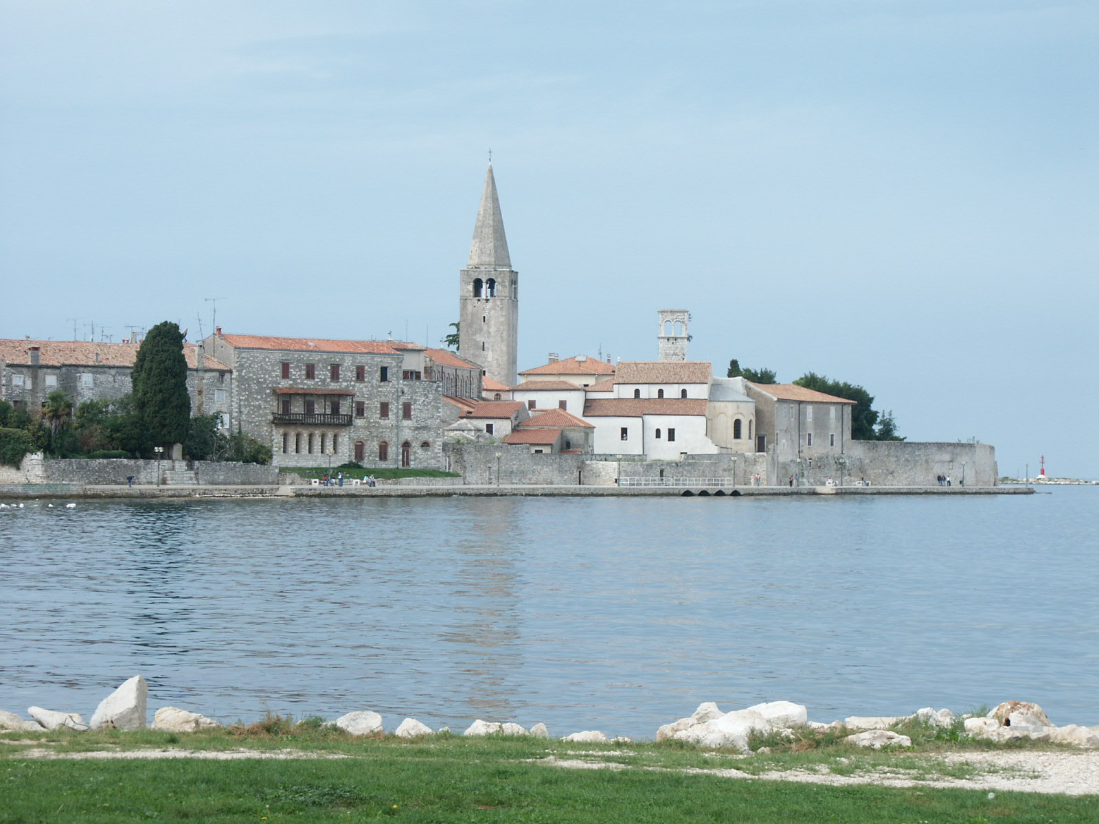 Panorama di Parenzo, Croazia.